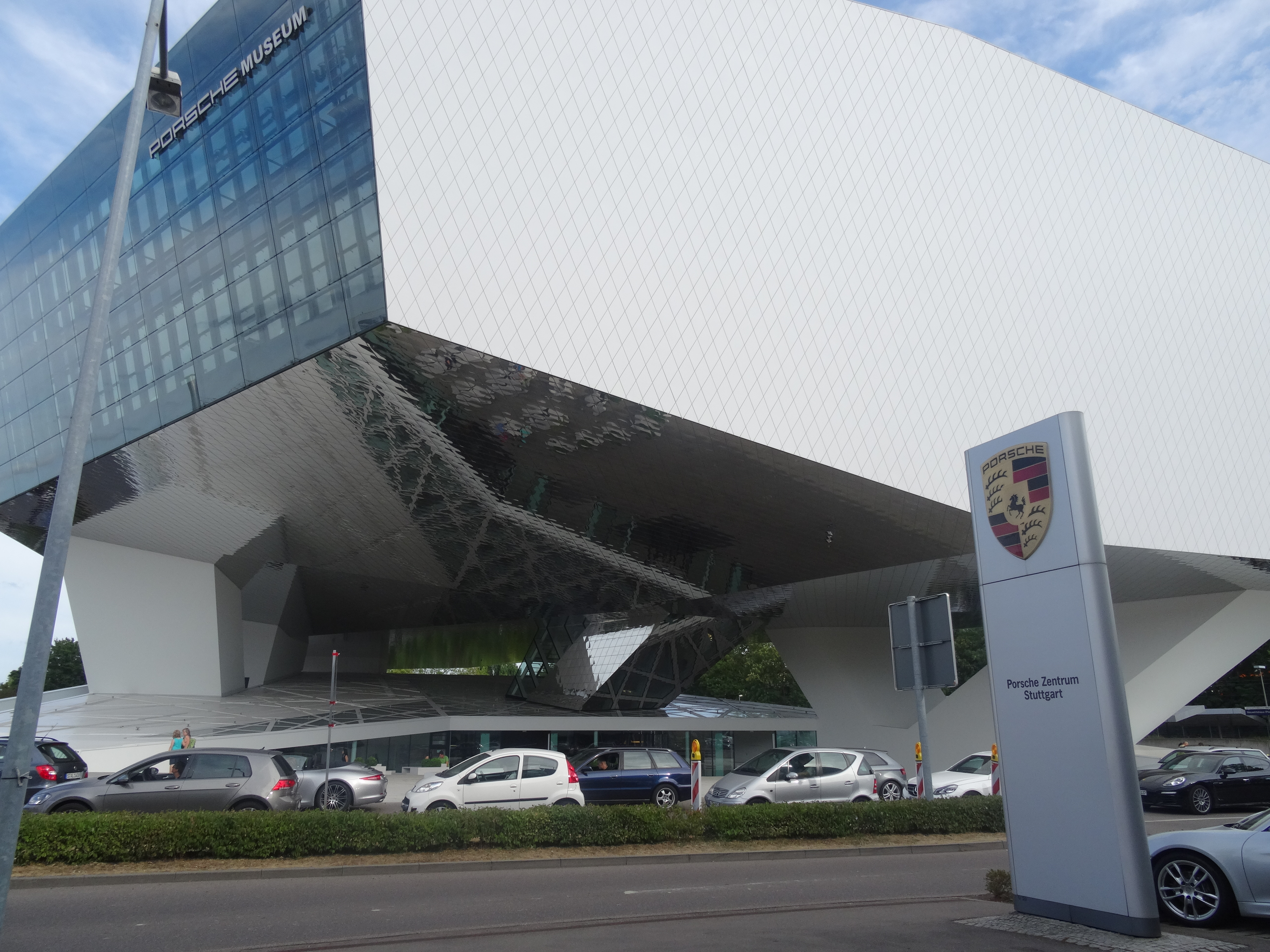 Das Porsche-Museum ist ein Automuseum in Stuttgart. Das Werksmuseum der Dr. Ing. h.c. F. Porsche AG befindet sich am Porscheplatz im Stadtteil Zuffenhausen. Am 31. Januar 2009 wurde der Museumsneubau für das Publikum eröffnet.